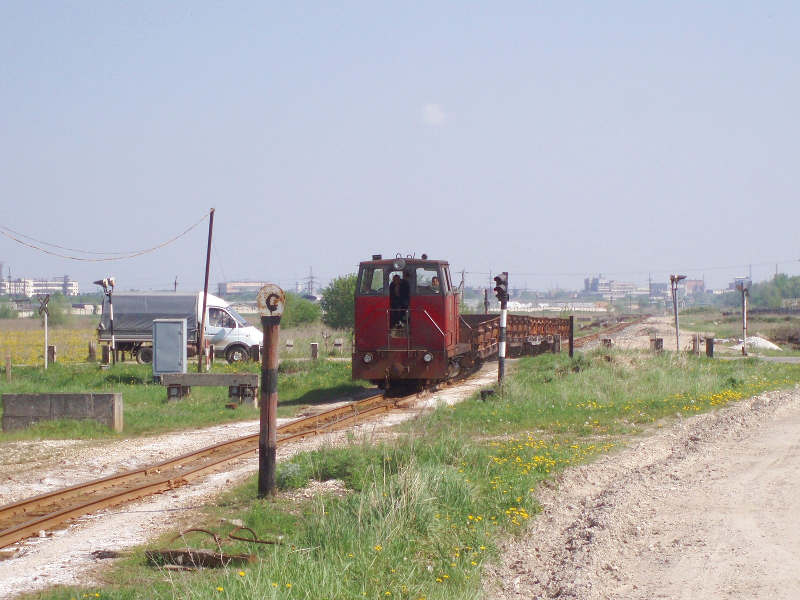 ТУ7А-3272 в Дзержинске, 21 мая 2007 года